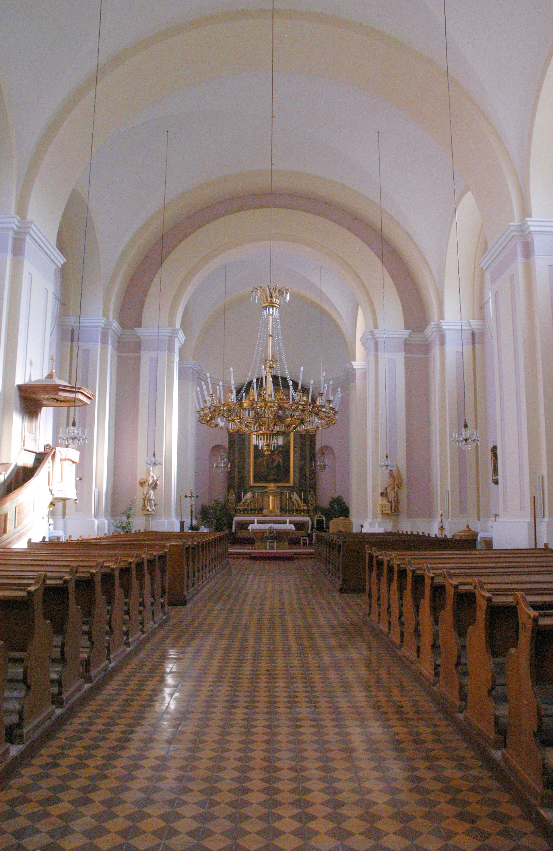 katholische Pfarrkirche heiliger Ulrich / Einblick nach Osten